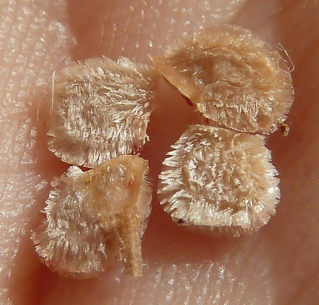 Solanum lycopersicum cv. pera : Semillas sueltas - Comercio, Águilas, Murcia (España).